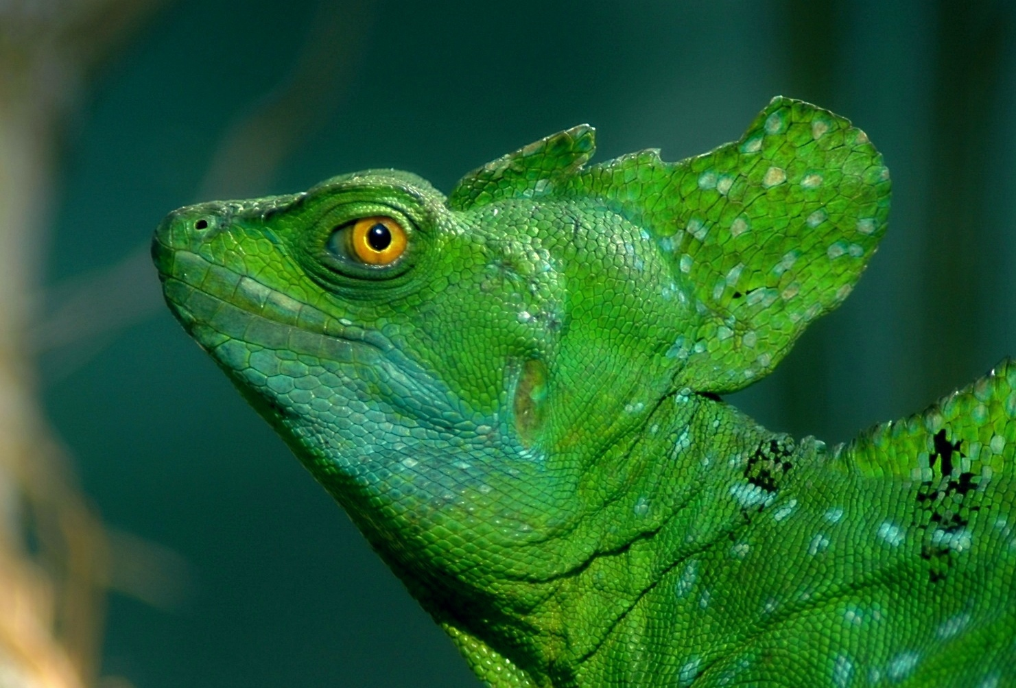 Kopf des Stirnlappenbasilisken im Profil